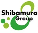 グループロゴマーク